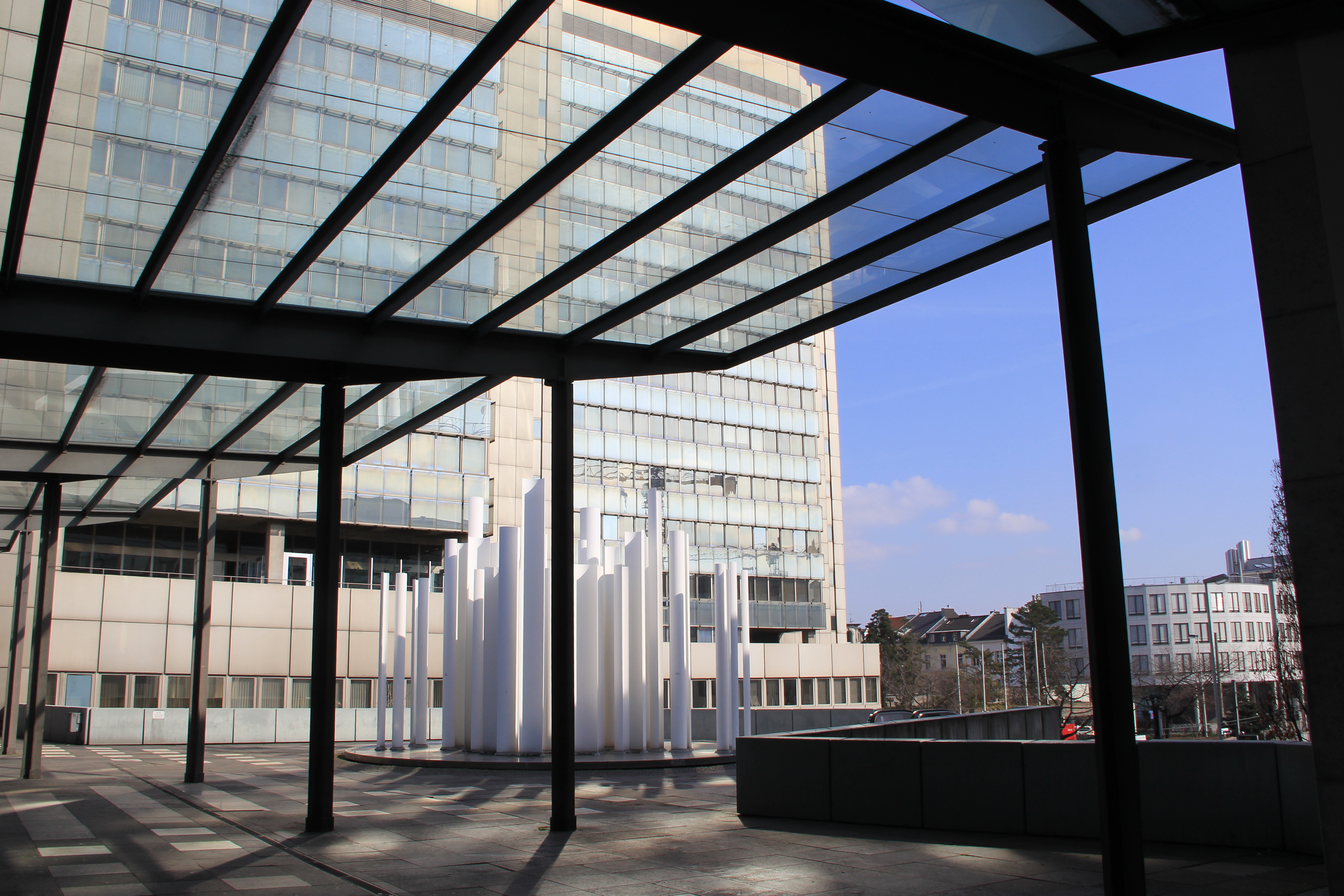 Stadthaus, Bonn: Stadthausbrücke, mit Blick auf die Brunnenskulptur "Wasserlichtfeldspiegel".